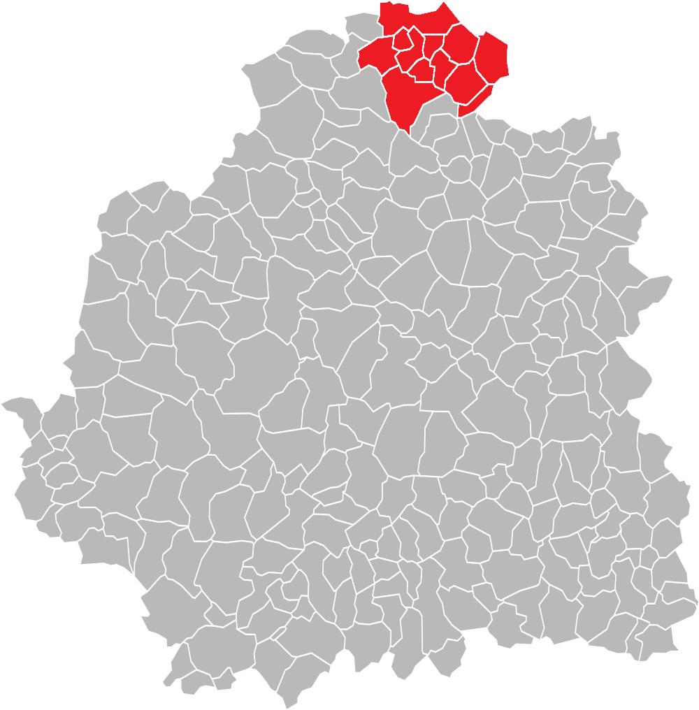 Carte des communes de l'Indre (36) : Le canton de Saint-Christophe-en-Bazelle, de 1790 à 2015.